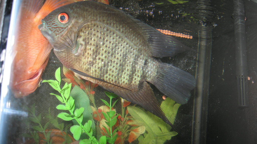 Ejemplar Salvaje de Heros Severus de 7 pulgadas. Propietario Jose Figueroa de Puerto Rico .